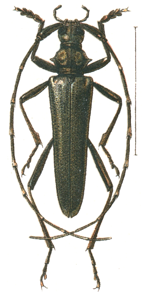 Distenia gracilis male